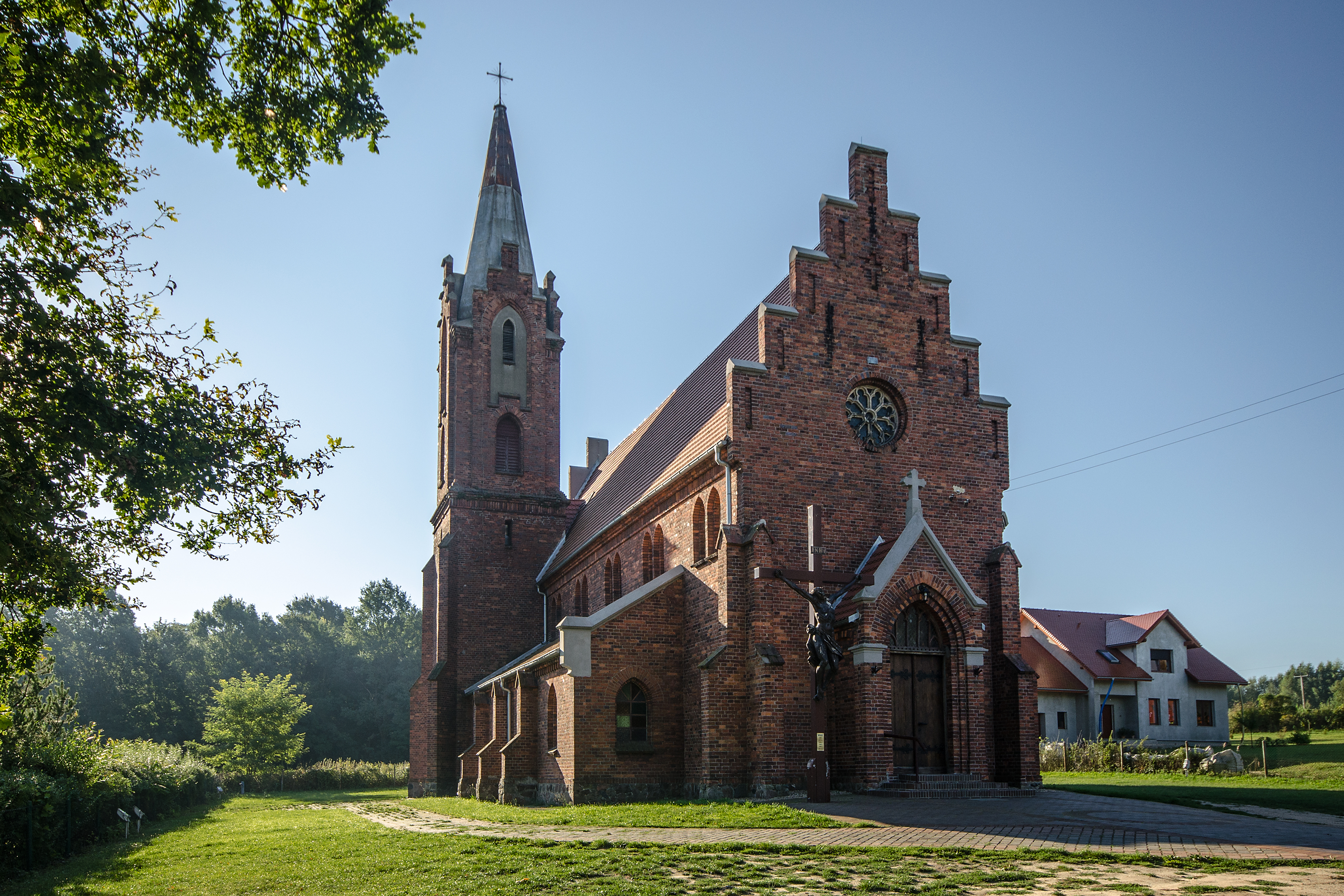 Brzezinka Średzka, kościół par. p.w. Matki Boskiej Królowej Polski, 1863